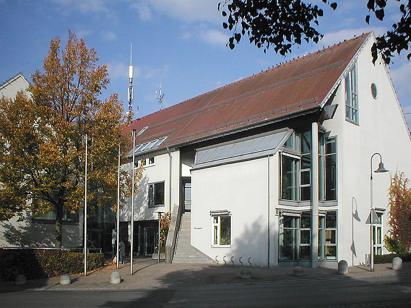 Rathaus in Aspach-Großaspach, Baden-Württemberg, Deutschland